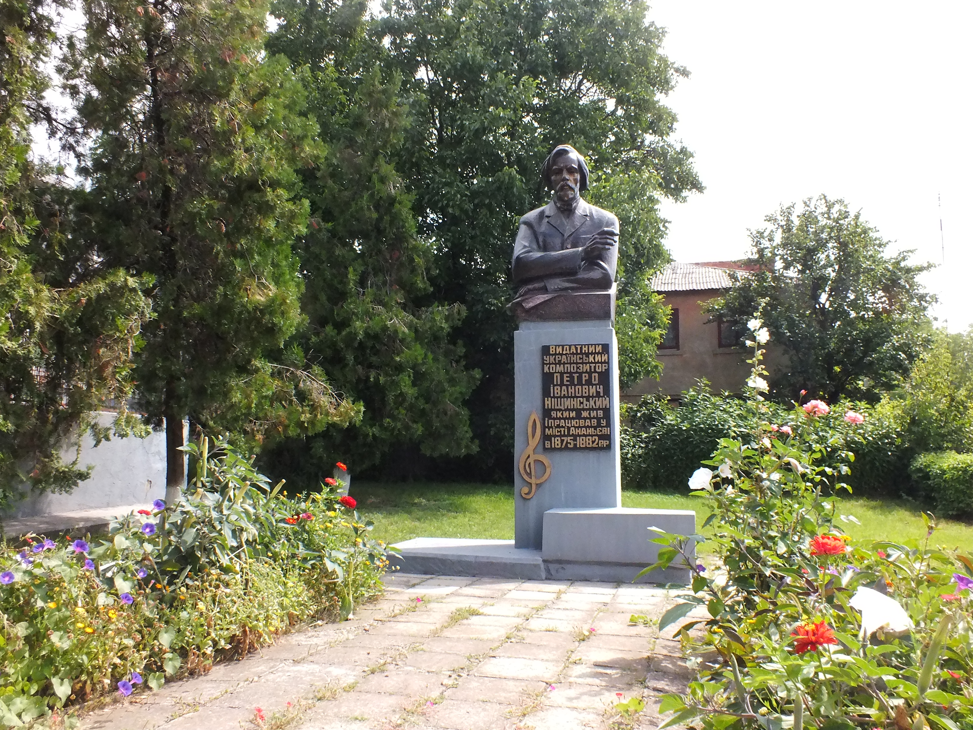 Пам’ятник П.І. Ніщинському 1875-1888, Ананьїв, Незалежності вул., 61 (біля музею)